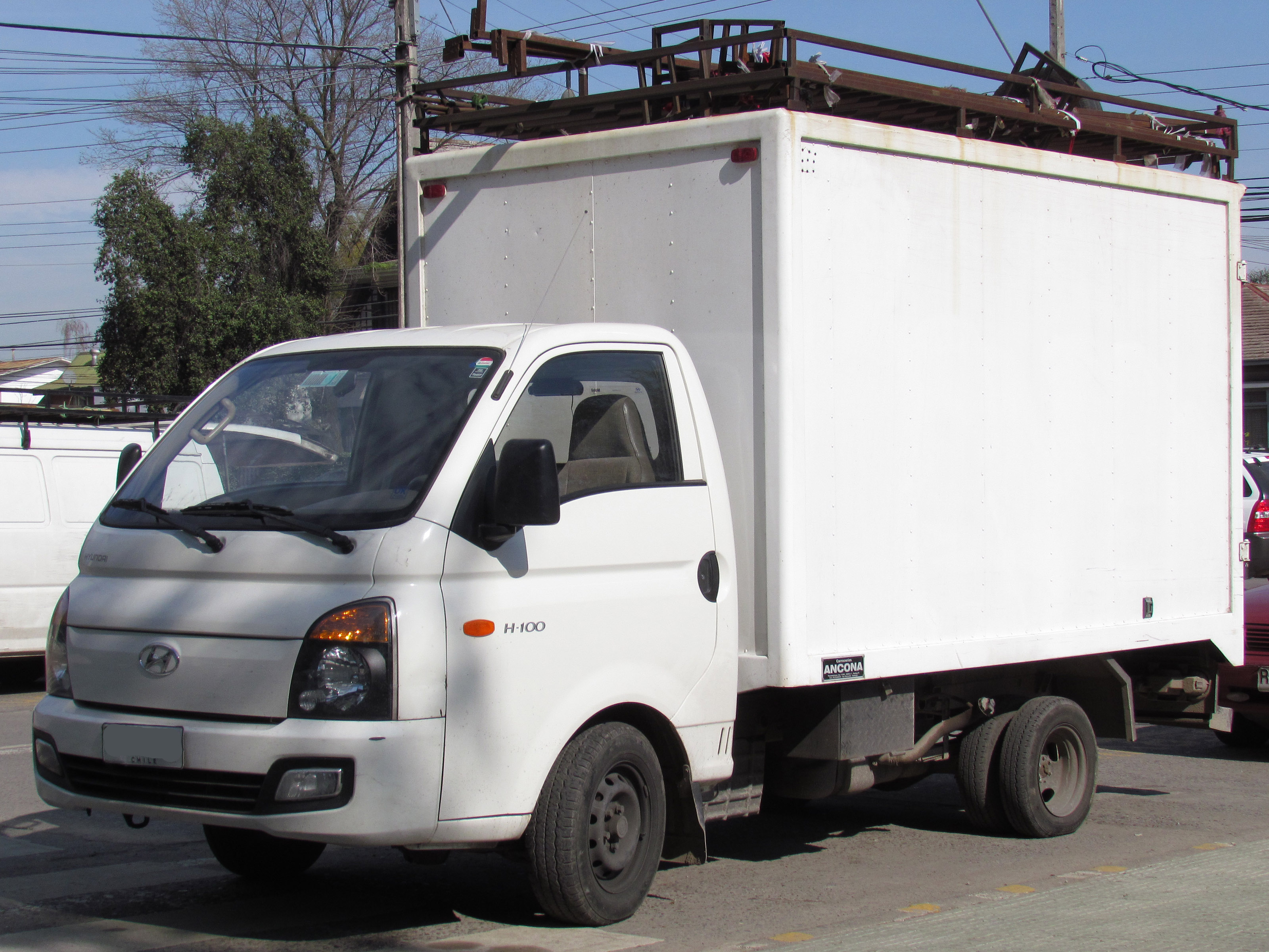 Hyundai H100 Porter 2013